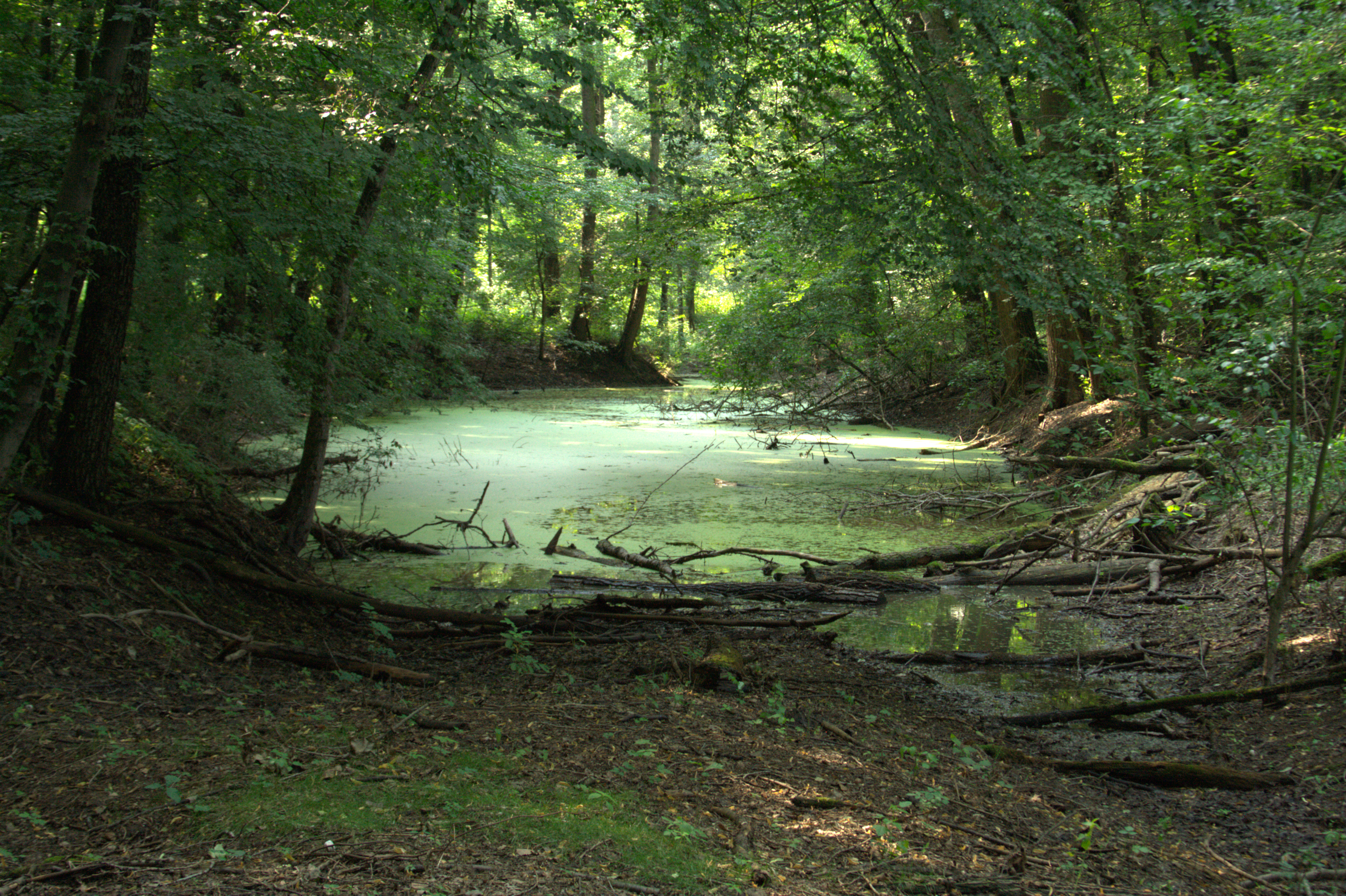 Lužní les v oblasti Hrbáčkových tůní.